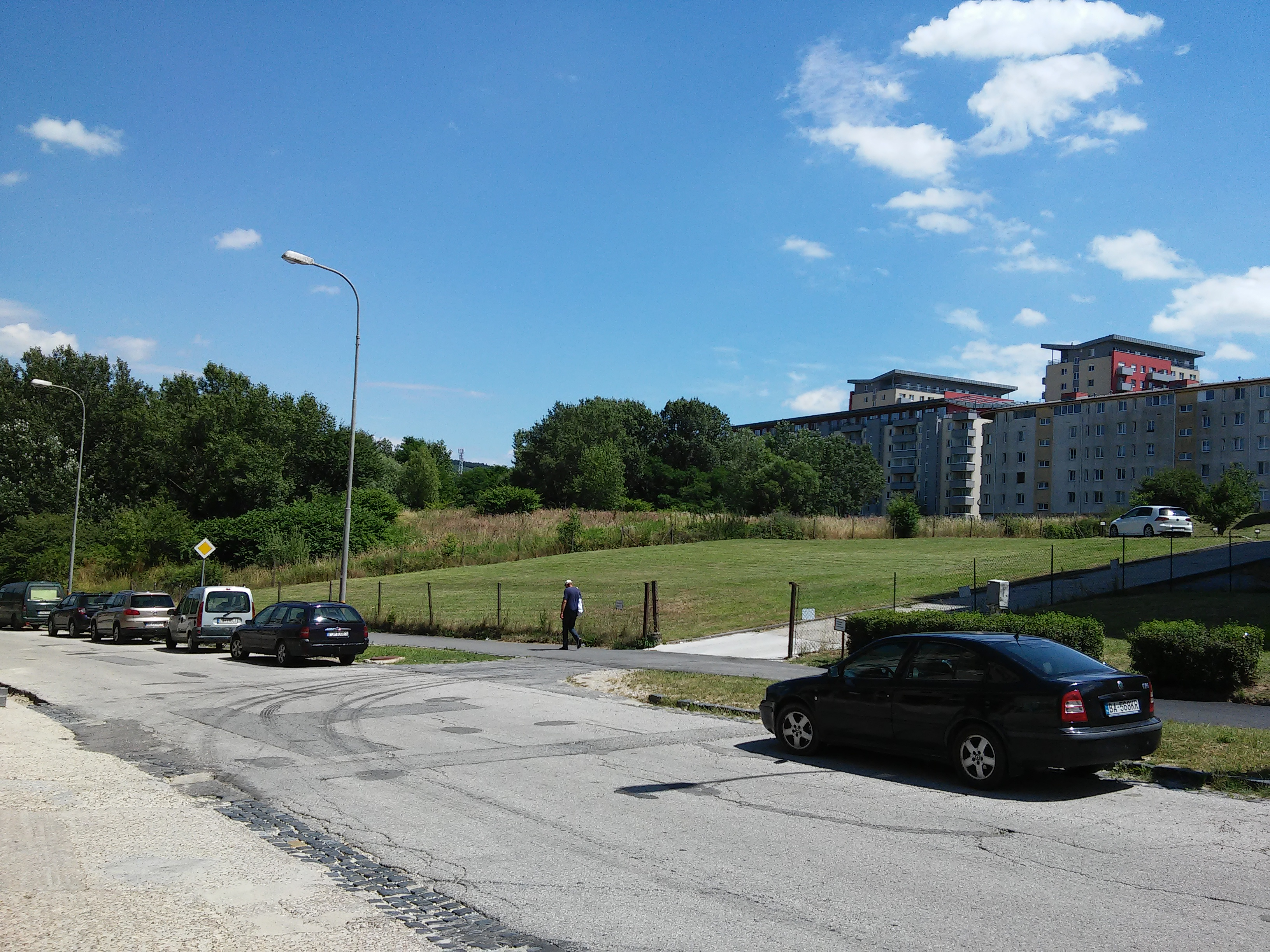 Dúbravčická, Dúvravka, Bratislava